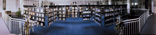 Innenaufnahme des Museums